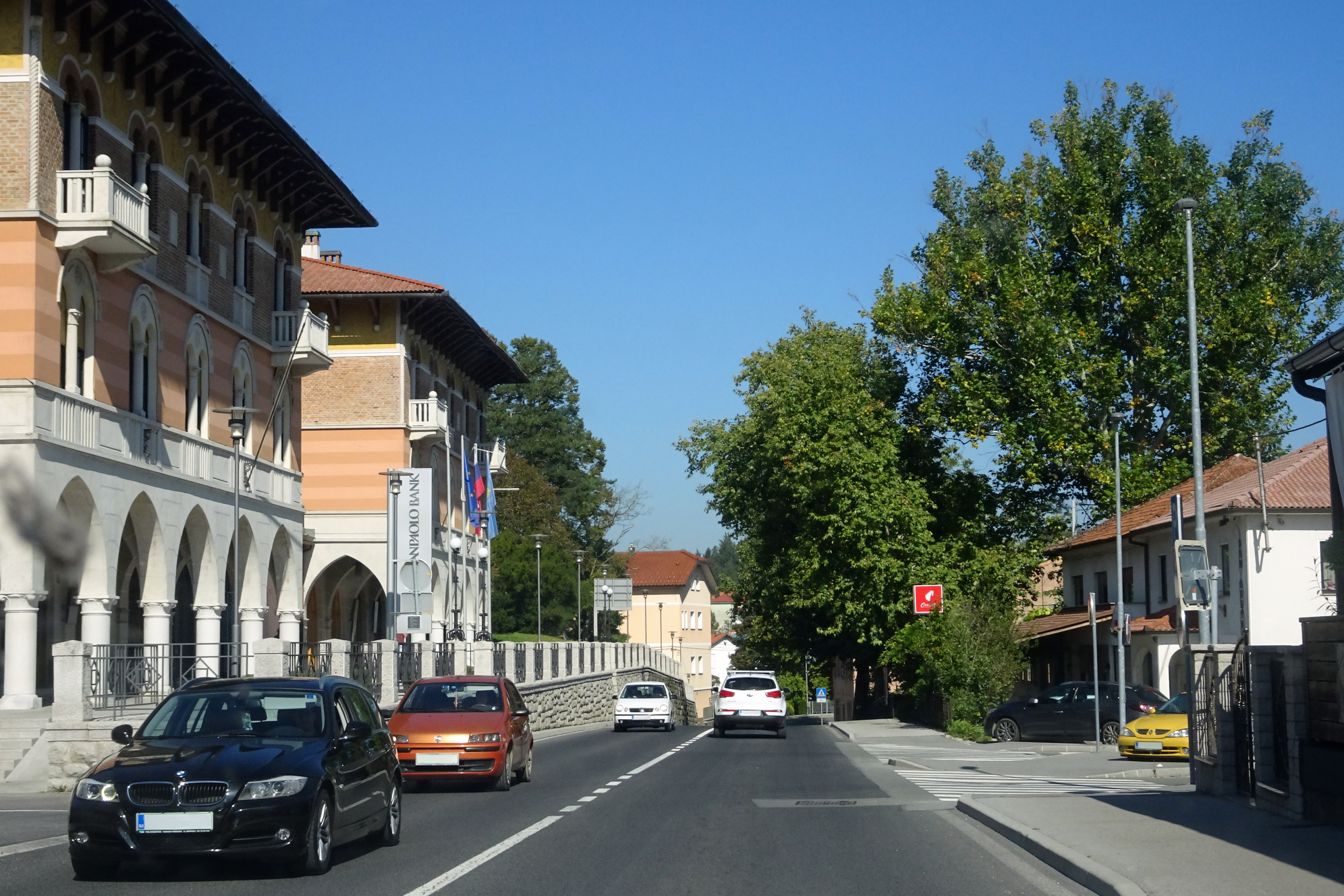 Ilirska Bistrica, Slovenia